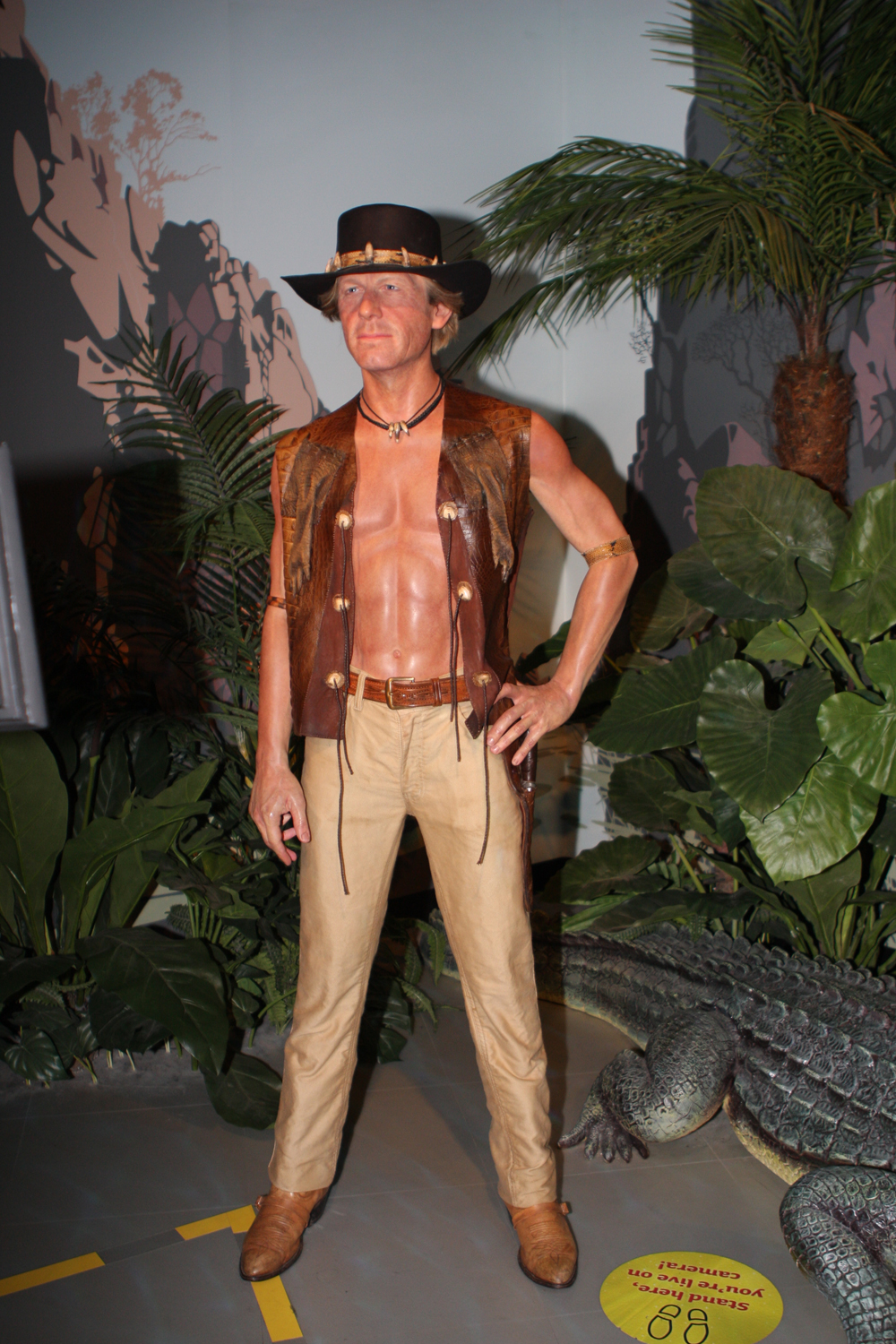 Crocodile Dundee